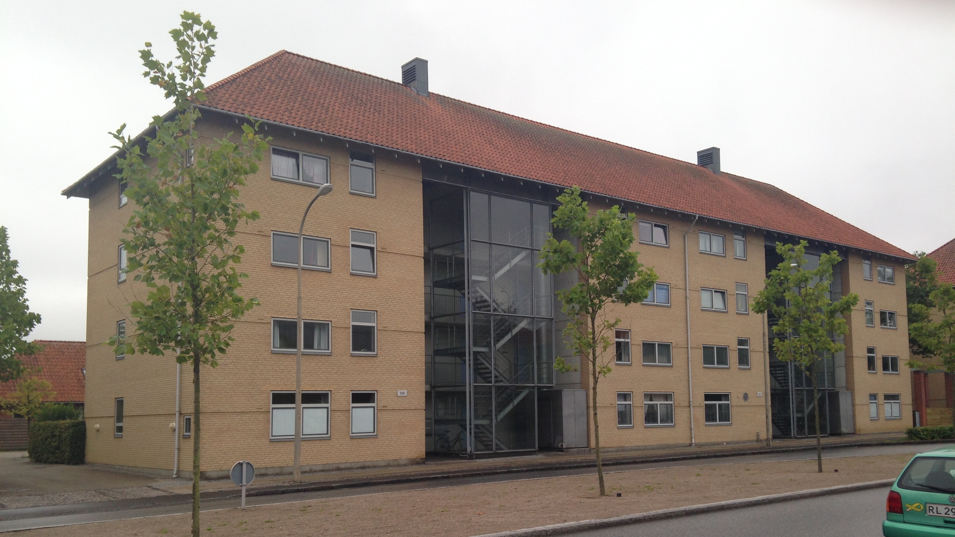 Lyngbygårdsvej 136, Kongens Lyngby, Copenhagen, Denmark.